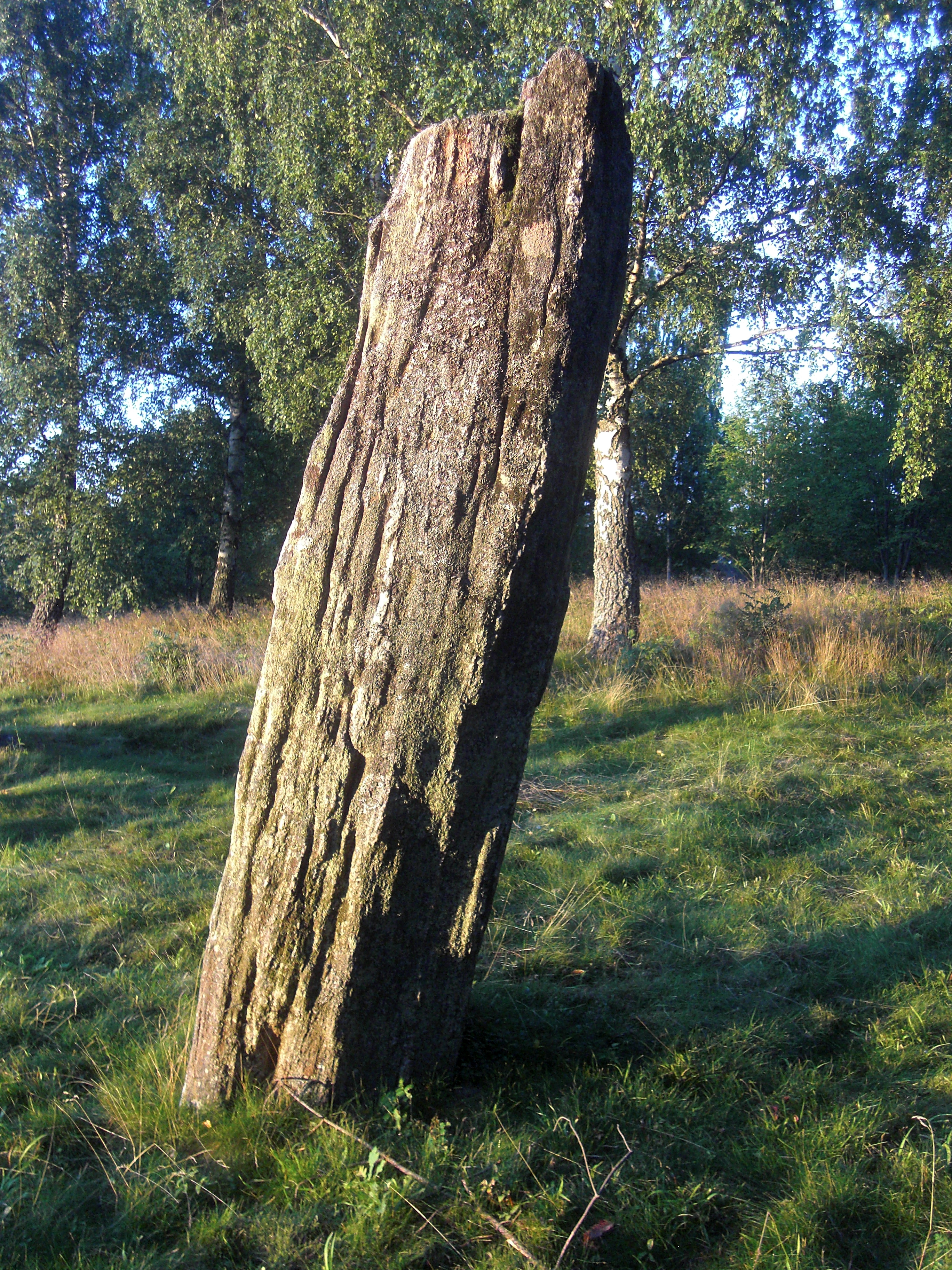 Rest sten på den nordvästra delen av gravfältet Nycklabacken (Raä-nr Tarsled 3:1) i Tarsleds socken i Kullings härad i Västergötland, Herrljunga kommun, f.d. Älvsborgs län, Västra Götalands län, Sverige.